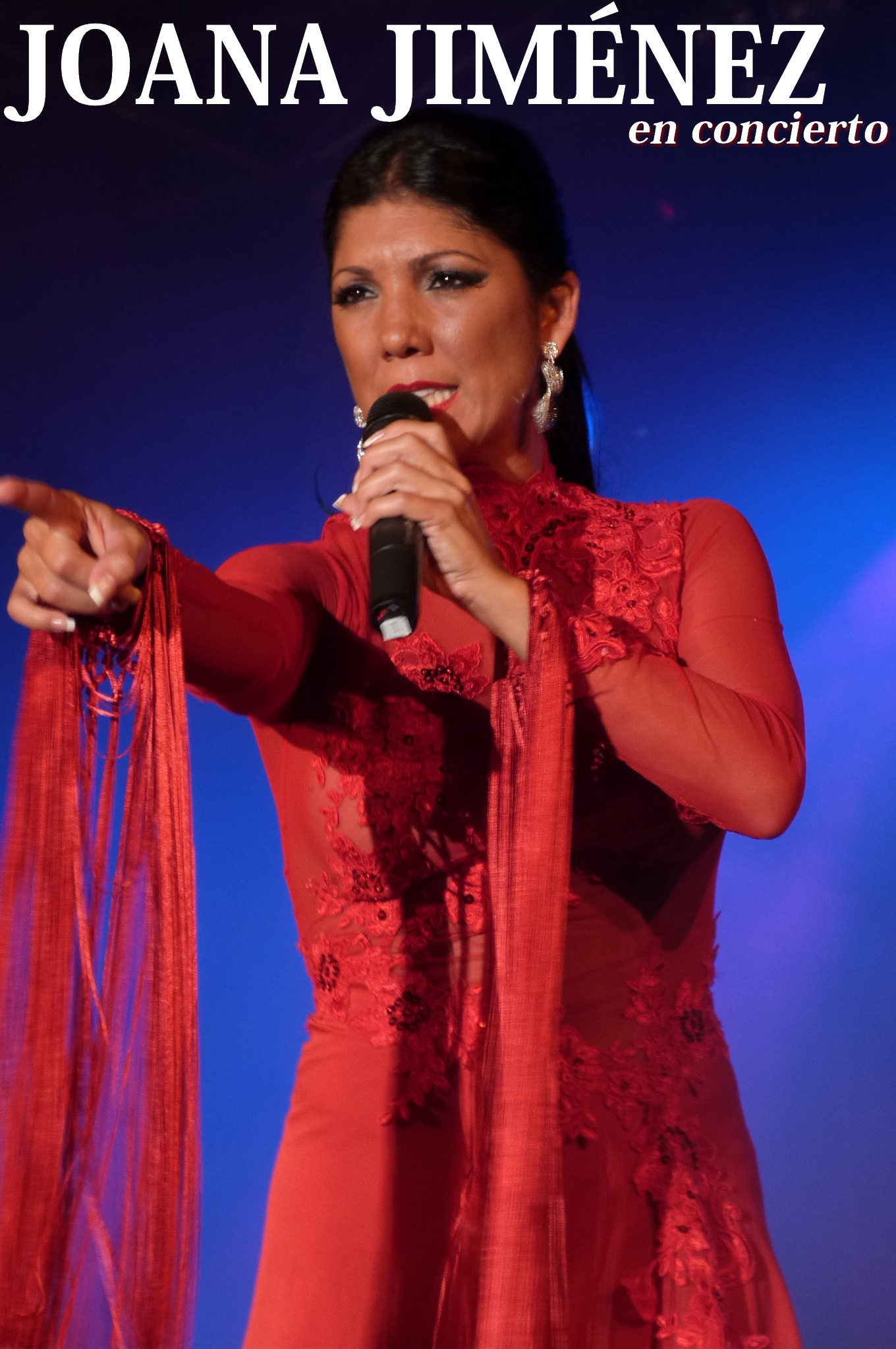 Concierto